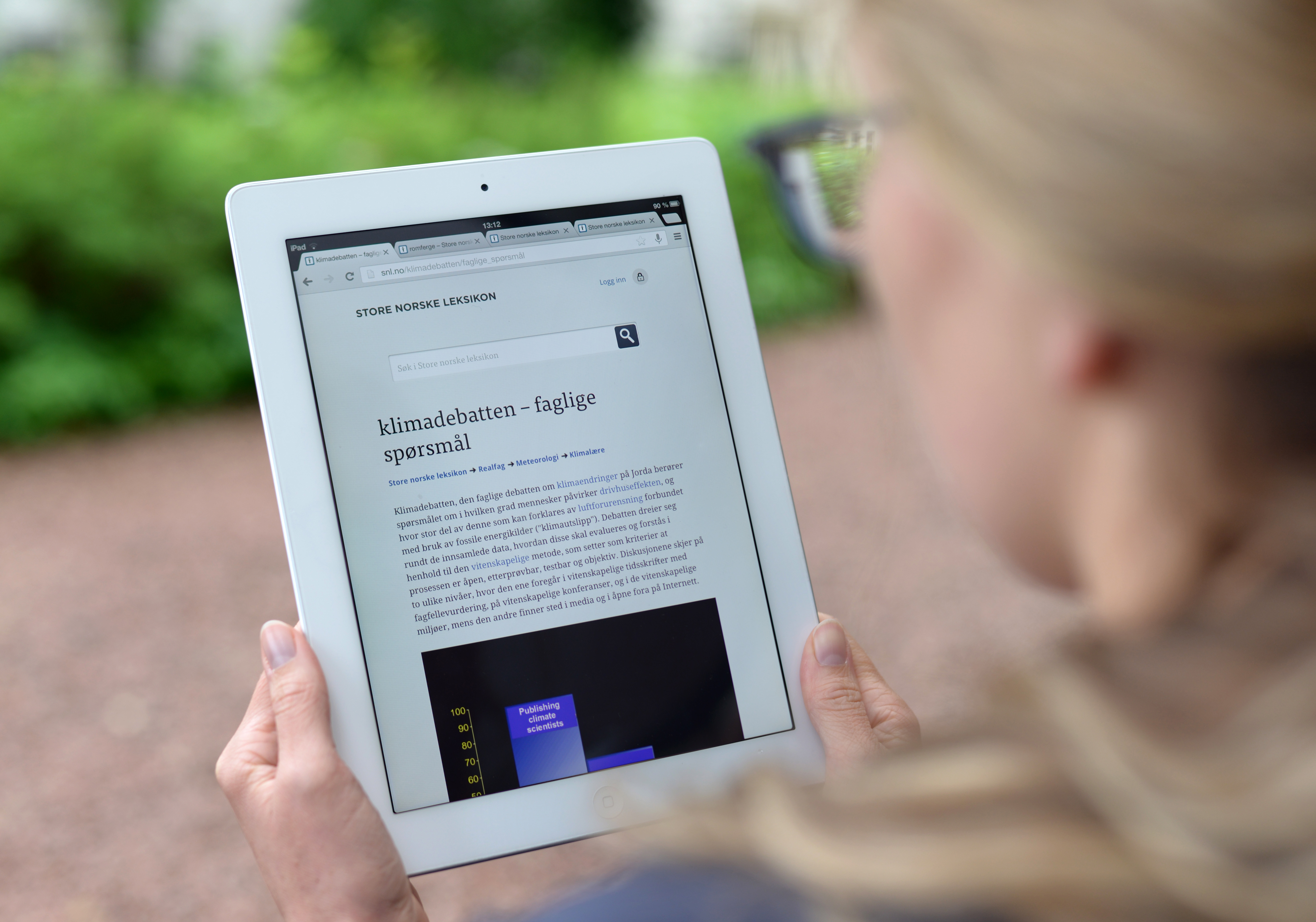 Store norske leksikon, tablet. snl.no SNL